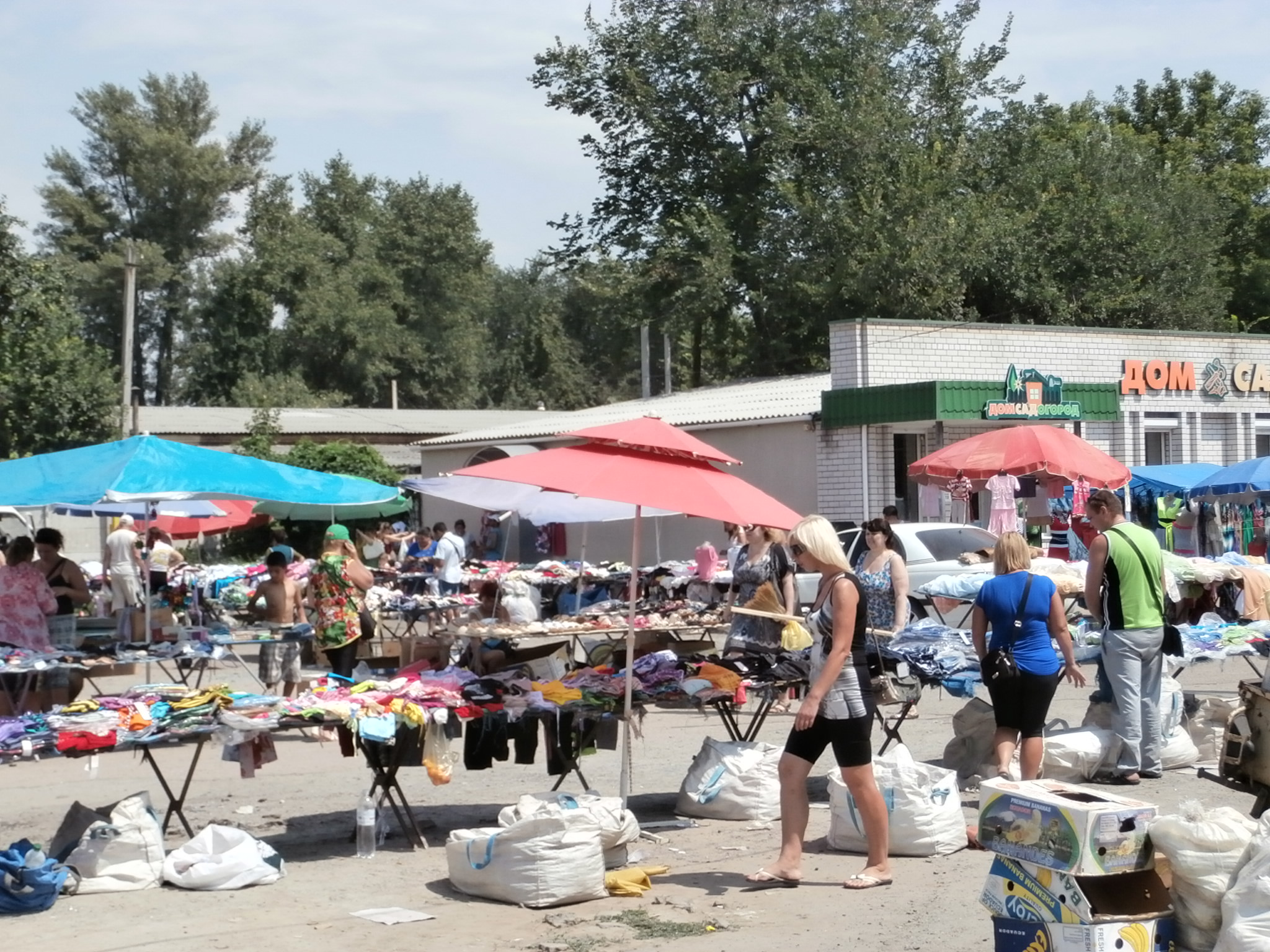 Sonntagsmarkt in Schowti Wody